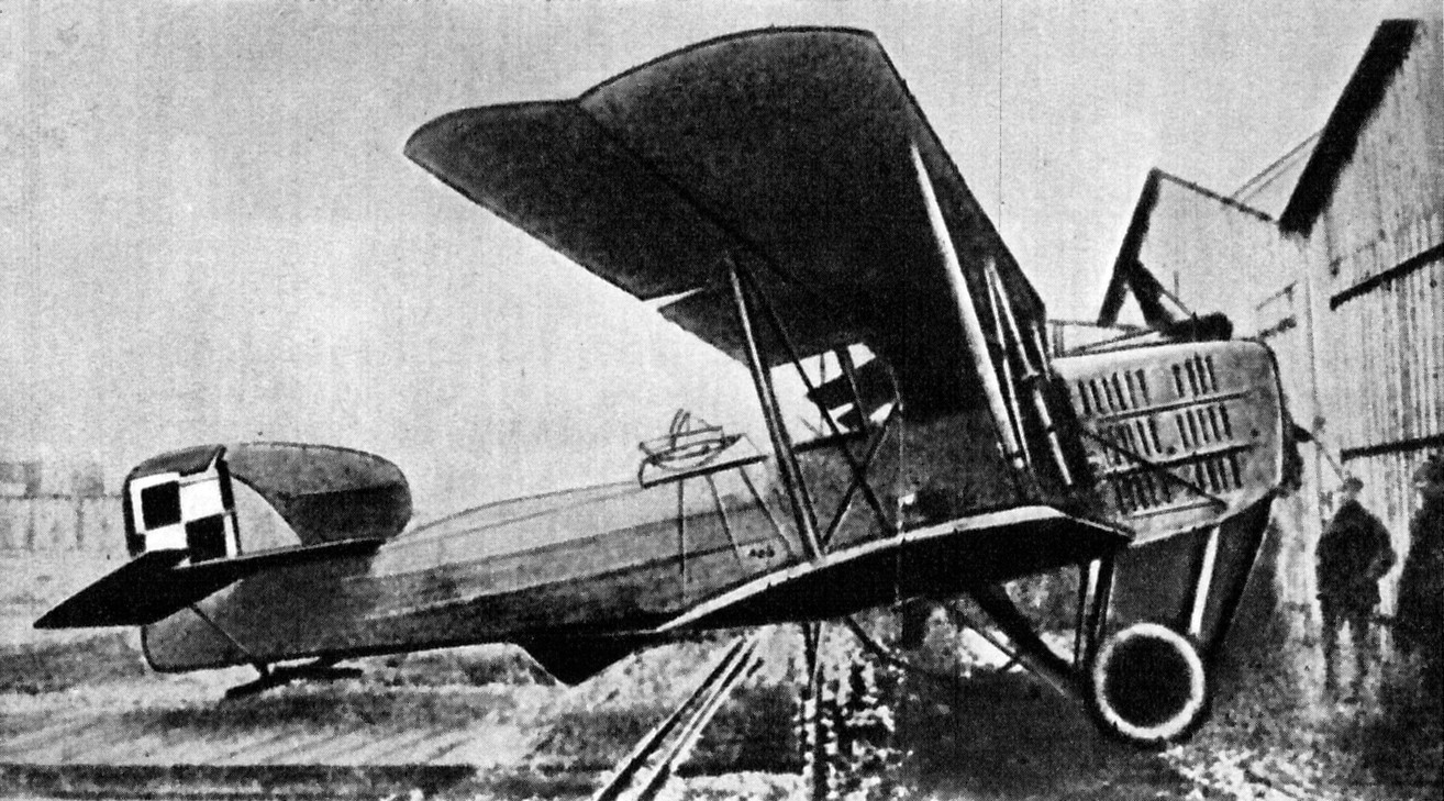 Francuski samolot bombowy Breguet 14B2.